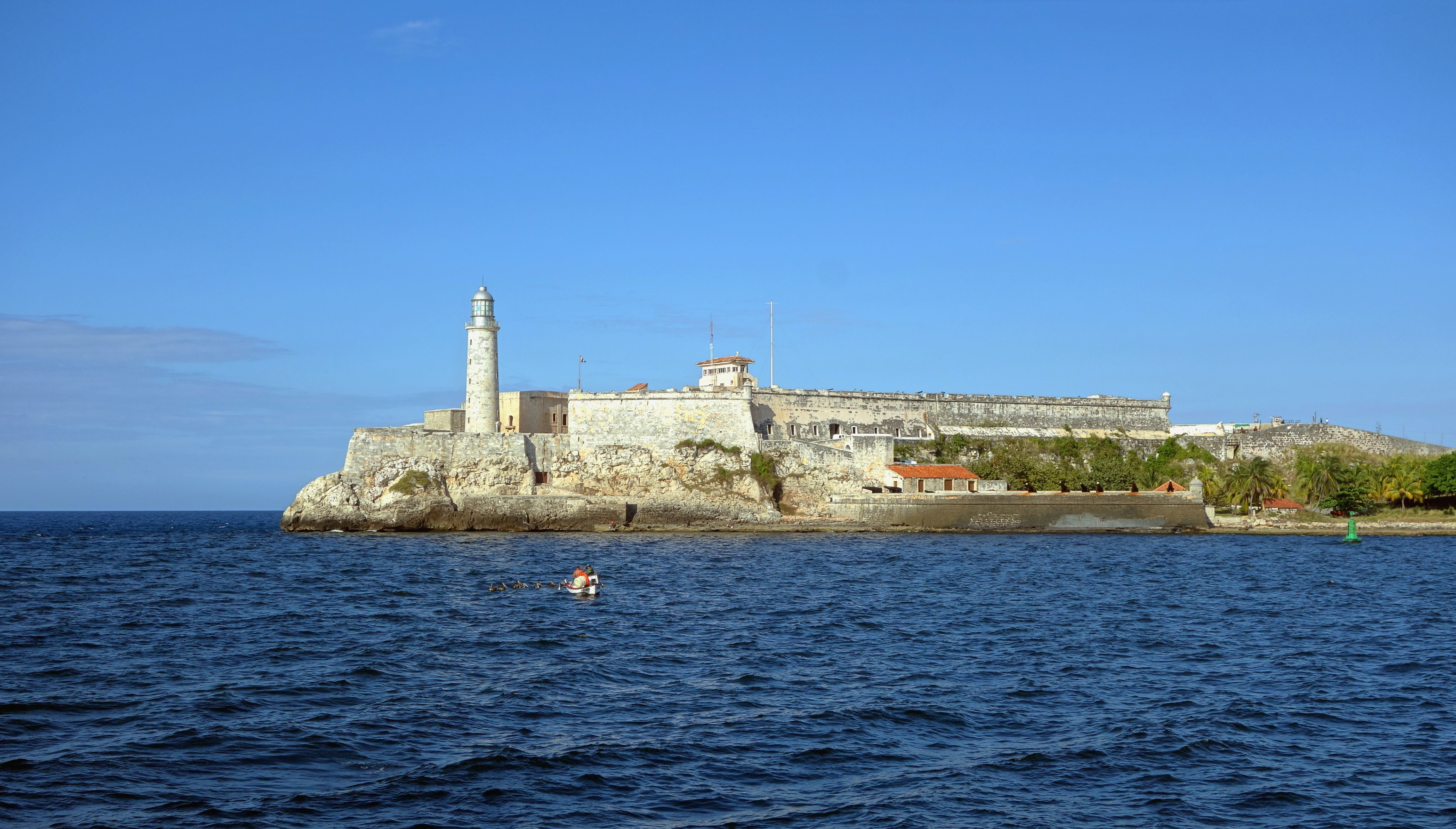 Vue sur le Castillo de los Tres Reyes del Morro de La Havane.